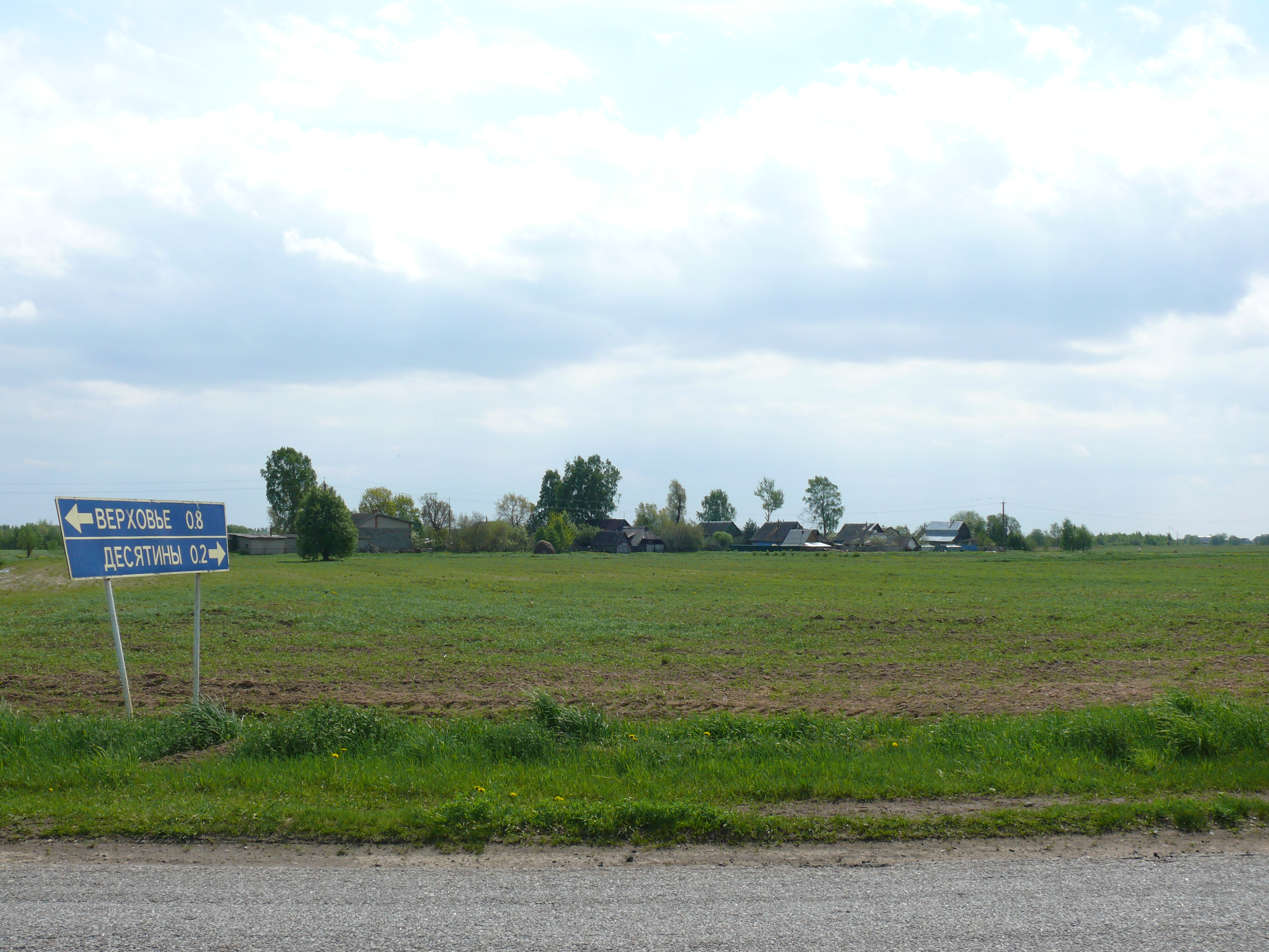 Деревня Десятины Новгородского района Новгородской области. Россия